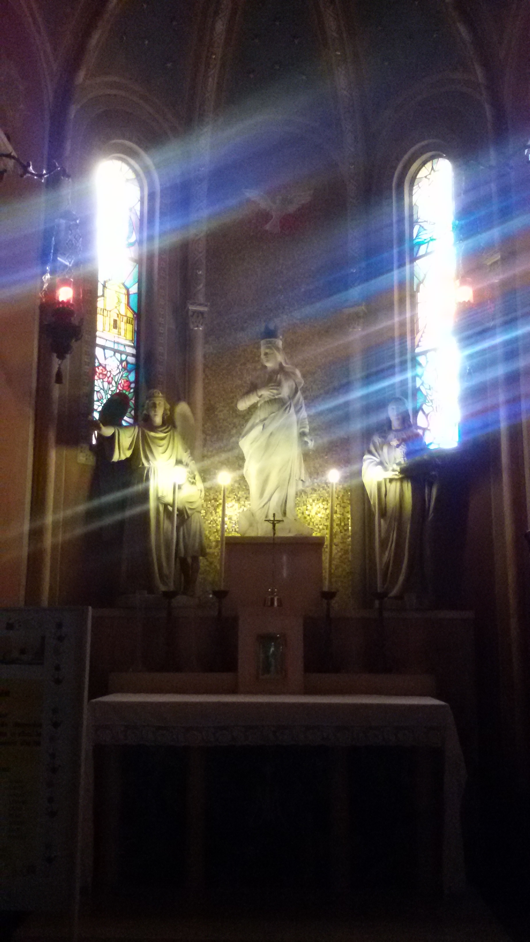 Chiesa di Santa Cristina Quinto di Treviso